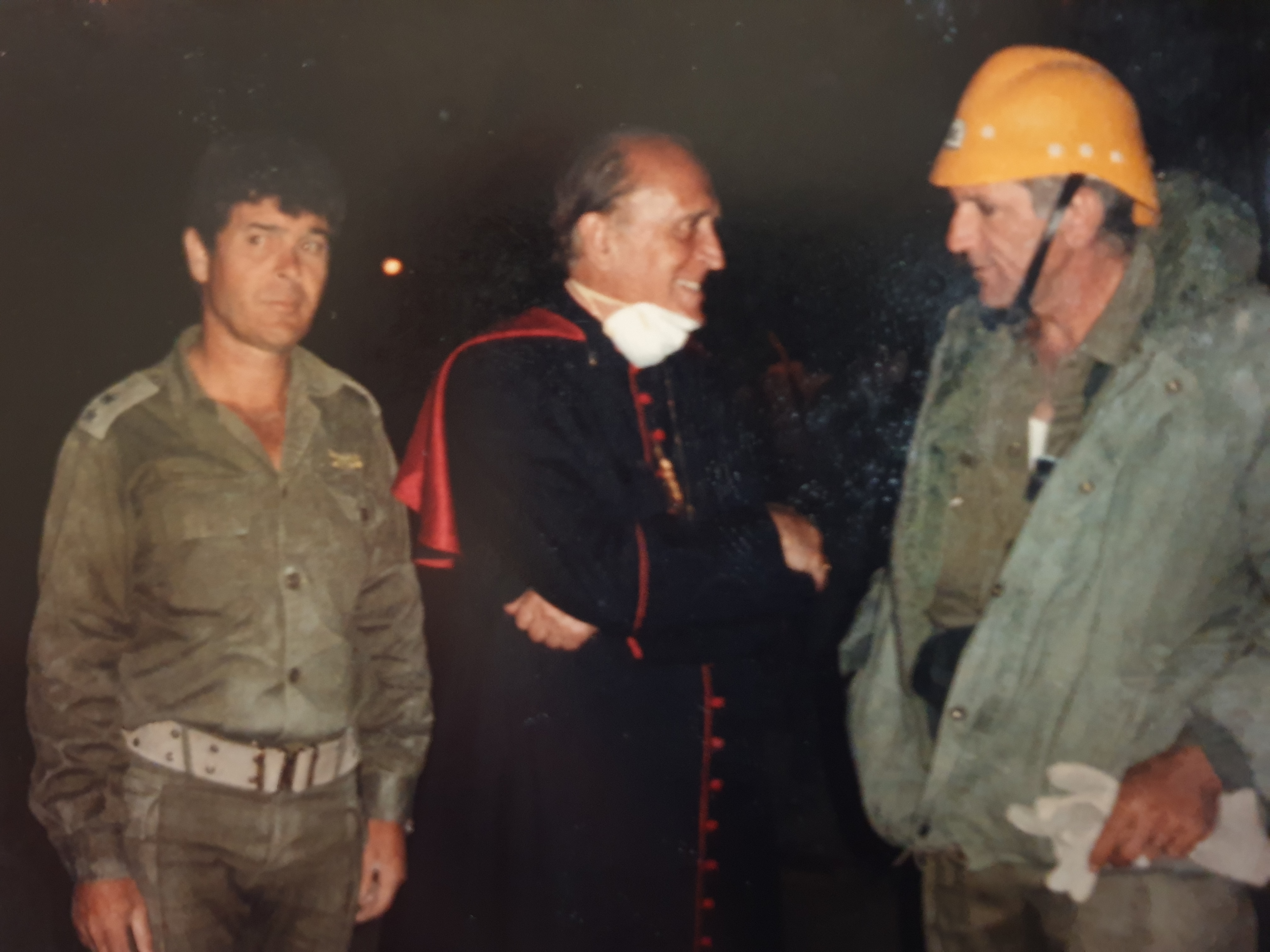 עם הארכיבישוף